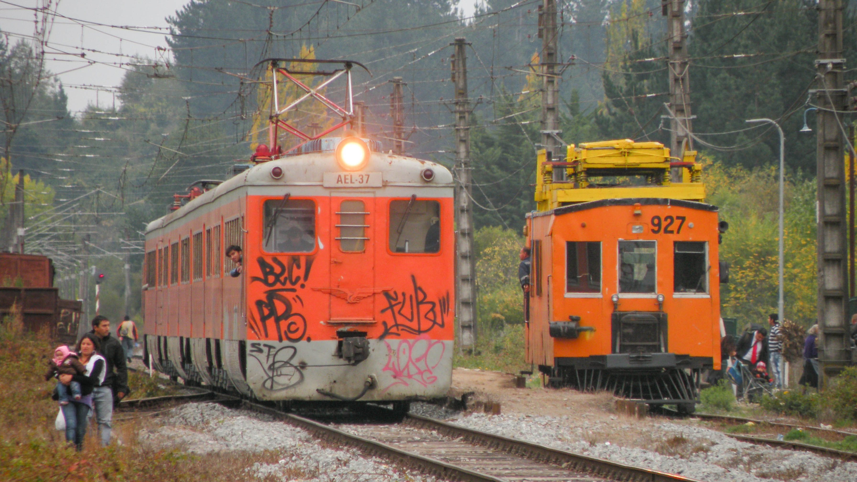 Cuando salir al ramal orillando el BioBio era siempre una caja de pandora, no importaban las condiciones climáticas, la variedad de equipos en circulación en ese entonces al final de la jornada te recompensaba al 1000%. Es así como desques de haber viajado un par de kilometros en el viejo autotorre, debíamos entrar a la vía local, para esperar la llegada del corto del laja de la mañana que en esos días aun corria con AEL y AES. Unihue fue entonces la estación en donde bajaríamos a sacar un par de fotos y a proseguir nuestra cacería hacia Talcamavida.